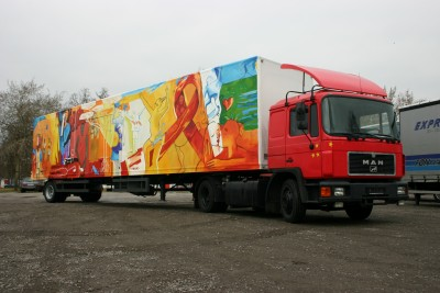 Der missio Aids Truck (Außenansicht)